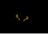 Bestibulu nukleoen egitura isolatua ikus daiteke hemen, entzefalo enborra kenduta.